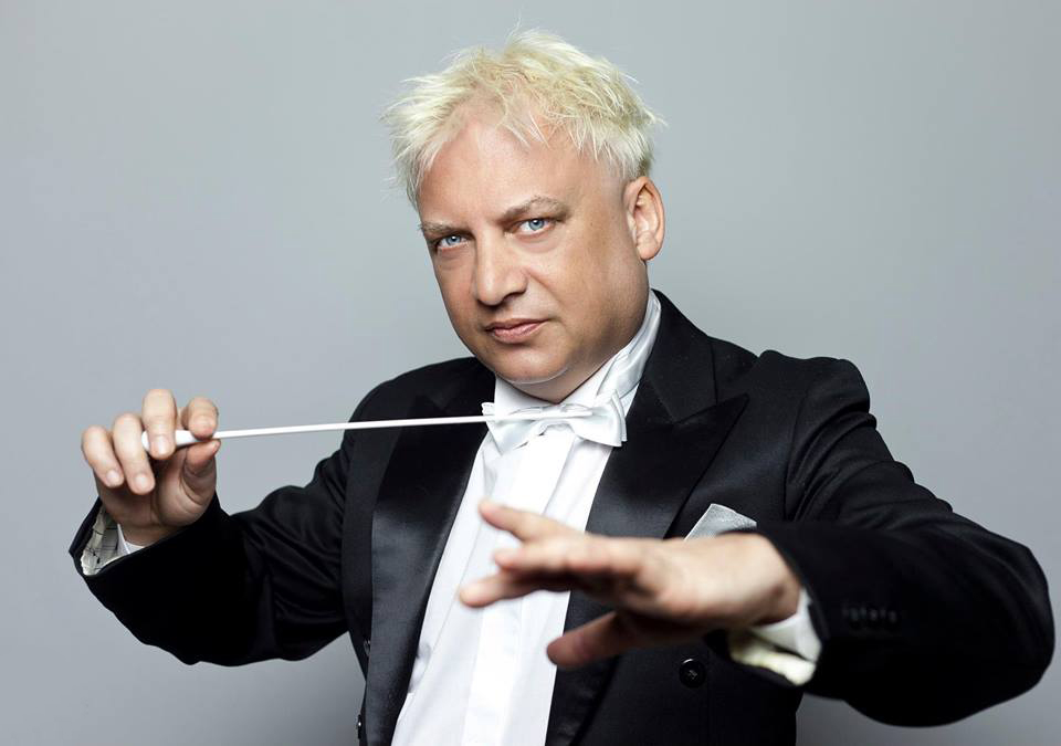 Maciej Pawłowski, portret